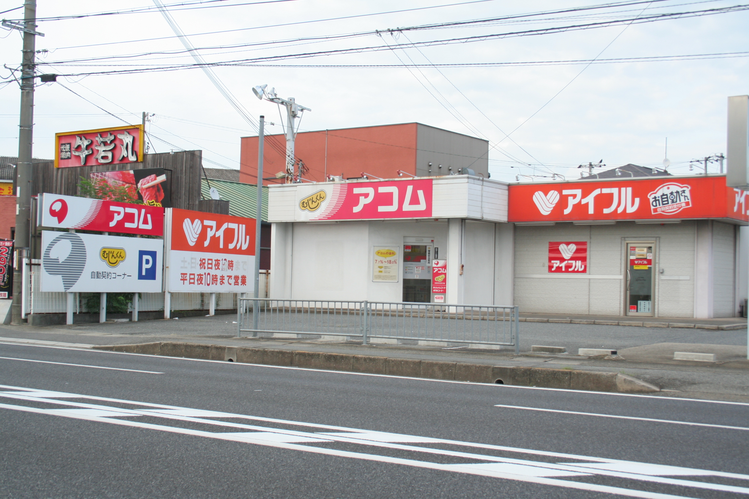 主に姫路市内の店舗の画像。そして飲食物。 日本の消費者金融アコムとアイフルの店舗。